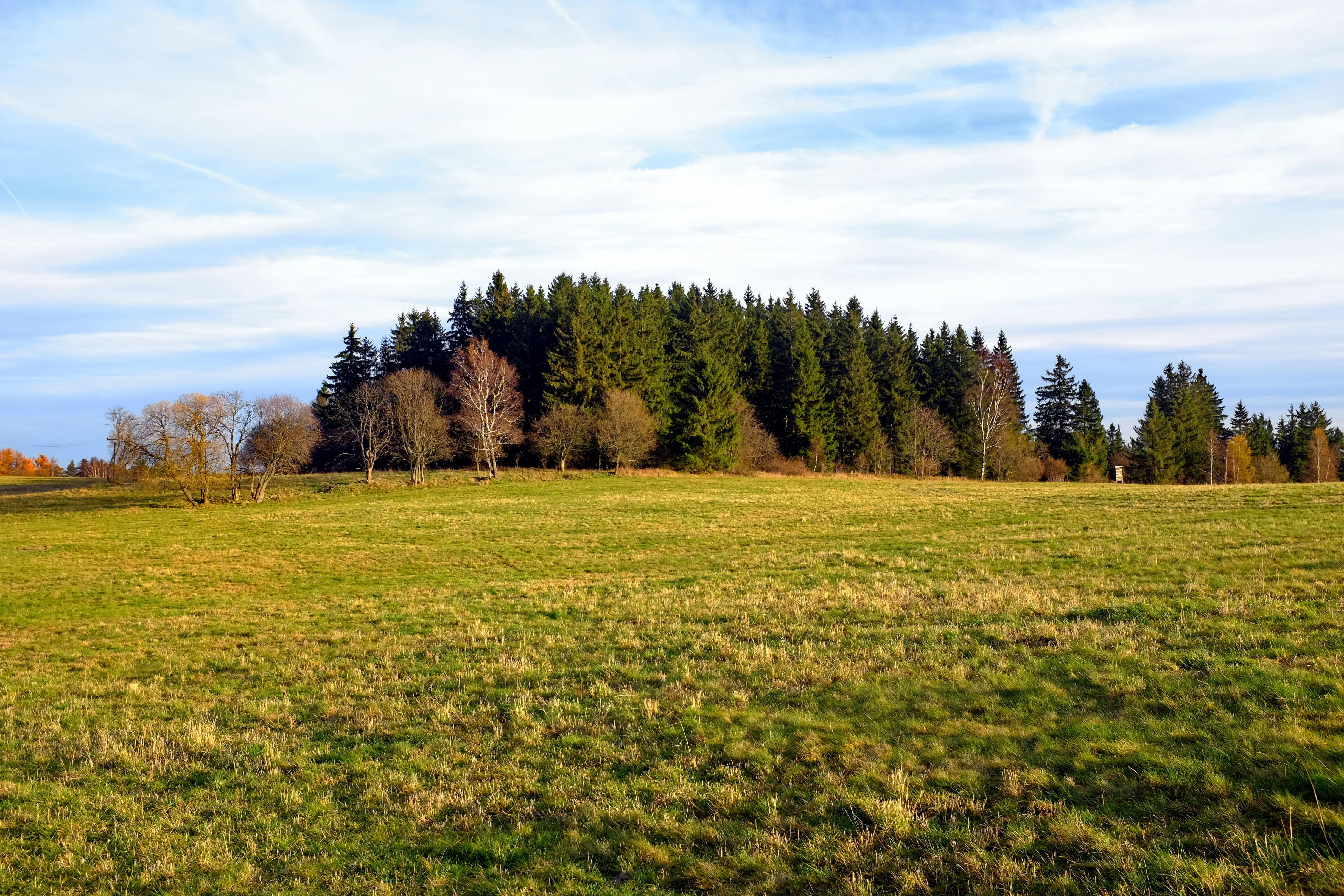 Krásenský vrch (777 m) nad Krásnem, pohled od západu, Slavkovský les, okres Sokolov